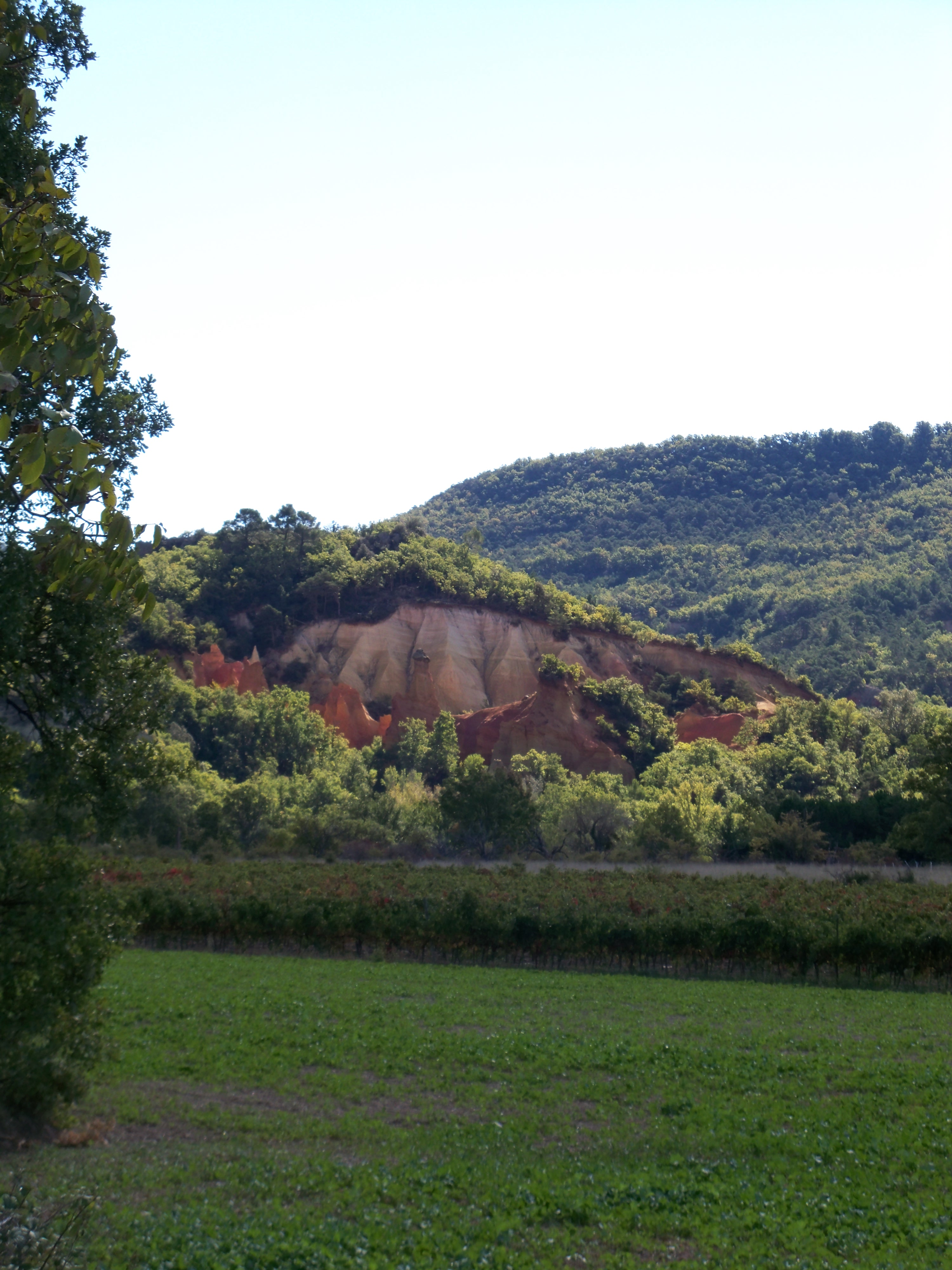 ocres à Rustrel, Vaucluse, France